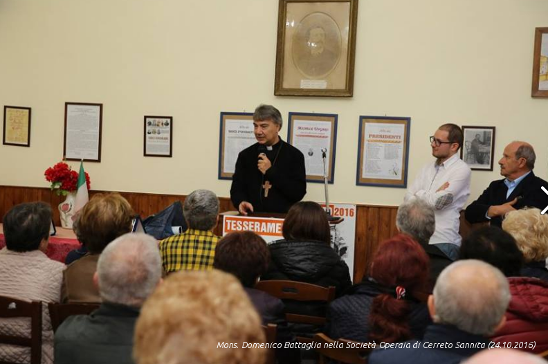 Il vescovo di Cerreto Sannita, Telese e Sant'Agata de' Goti Mons. Domenico Battaglia saluta i soci della Società Operaia di Mutuo Soccorso di Cerreto Sannita (Benevento).